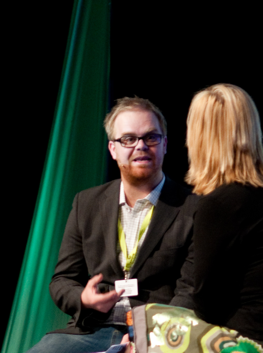 Morten Mørland - Tegnet seg til topps